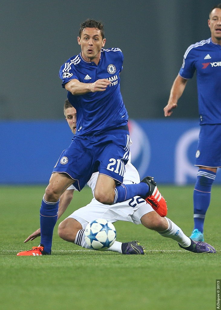 20.10.2015 Kyiv, Olimpiyskiy National Sports Complex Champions League. Group stage. FC Dynamo Kyiv - Chelsea - 0:0 Chelsea (4-2-3-1): Begovic; Zouma, Cahill, JT (c), Azpilicueta; Ramires, Matic; Willian, Fabregas (Oscar 75), Hazard; Diego Costa. Unused subs Blackman, Baba, Mikel, Traore, Kenedy, Falcao. Booked Zouma 67 Dynamo Kiev (4-1-4-1): Shovkovskiy; Danilo Silva, Khacheridi, Dragovic, Vida; Rybalka; Yarmolenko, Sydorchuk, Buyalskiy (Garmesh 83), Gonzalez; Kravets (Junior Moraes 78). Unused subs Rybka, Antunes, Petrovic, Gusev, Miguel Veloso. Booked Buyalskiy 65 20.10.2015 г.Киев. НСК "Олимпийский". Лига Чемпионов. Групповой этап Динамо — Челси 0:0 Динамо: Шовковский — Данило Силва, Драгович, Хачериди, Вида — Рыбалка, Буяльский (Гармаш, 83) — Ярмоленко, Сидорчук, Гонсалес — Кравец (Мораес, 78) Челси: Бегович — Аспиликуэта, Терри, Кэхилл, Зума — Матич, Рамирес — Виллиан, Фабрегас (Оскар, 75), Азар — Д. Коста Предупреждения: Буяльский — Зума